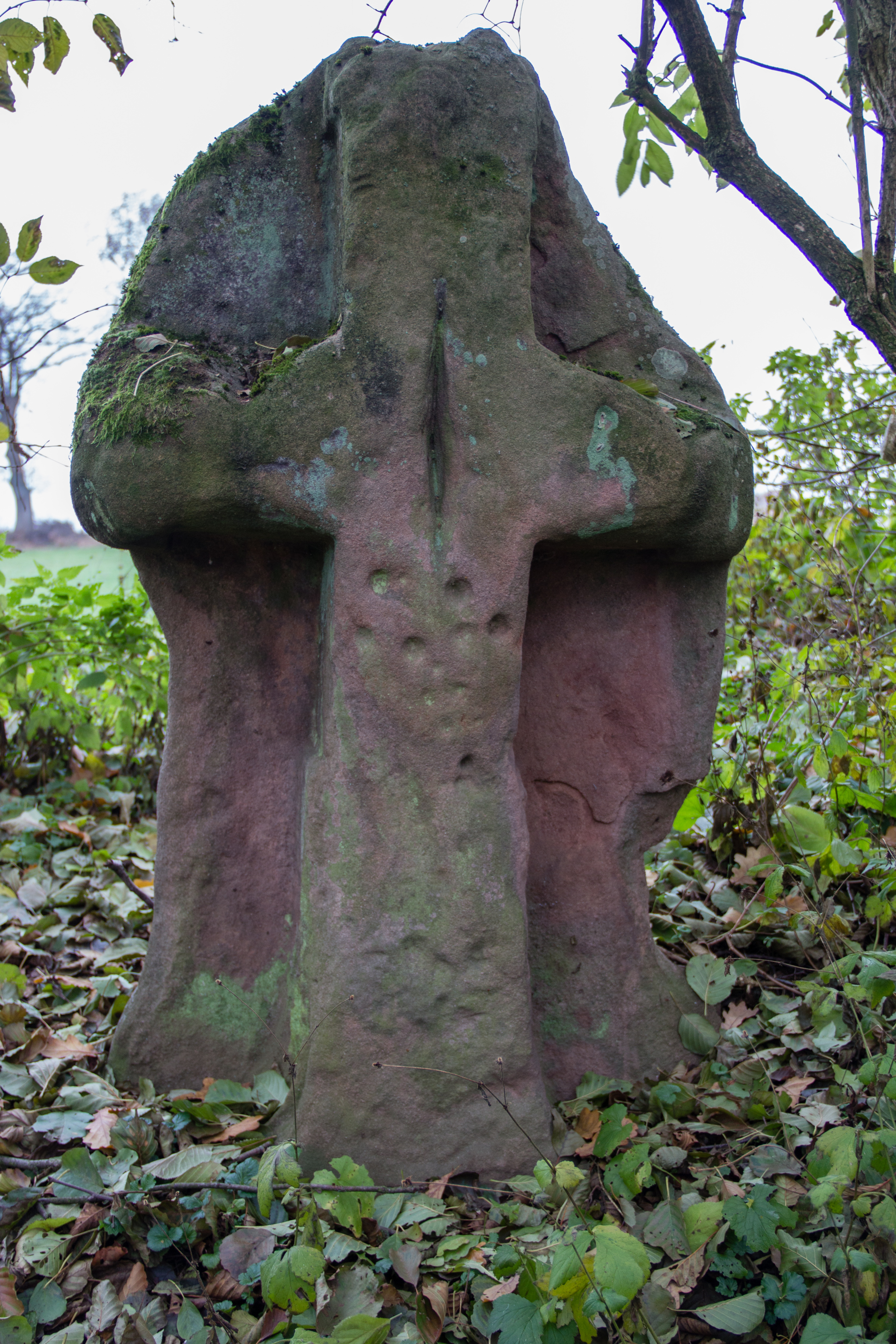 Kreuzstein,Sandstein, bei Mindorf